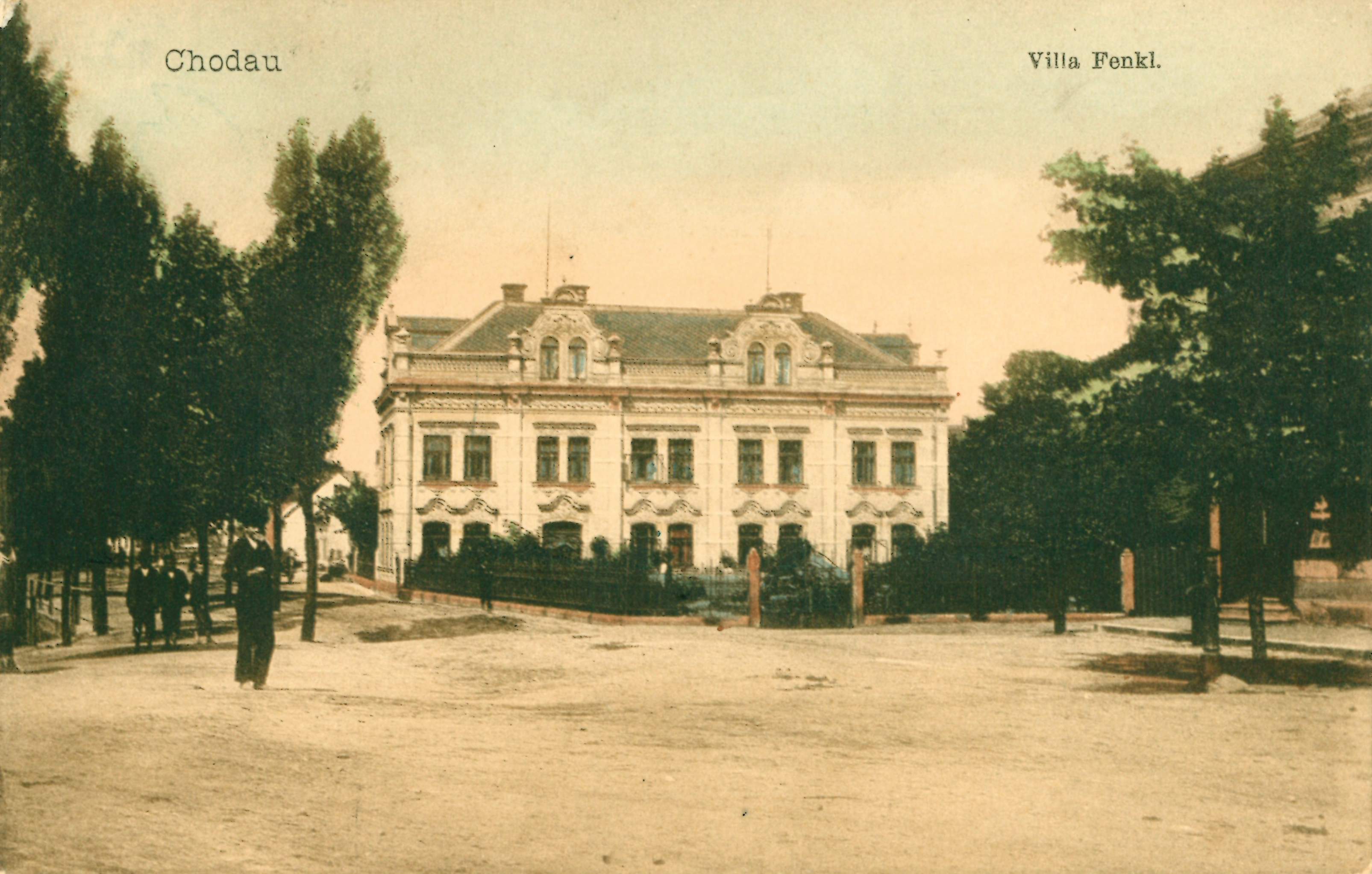 Vila chodovského továrníka a starosty Karla Fenkla, vystavěná v několika etapách mezi lety 1880-1900. Rodina ji obývala až do roku 1945, kdy museli odejít do Německa. Počátkem 60. let byla vila zbořena v rámci sanace staré zástavby města.